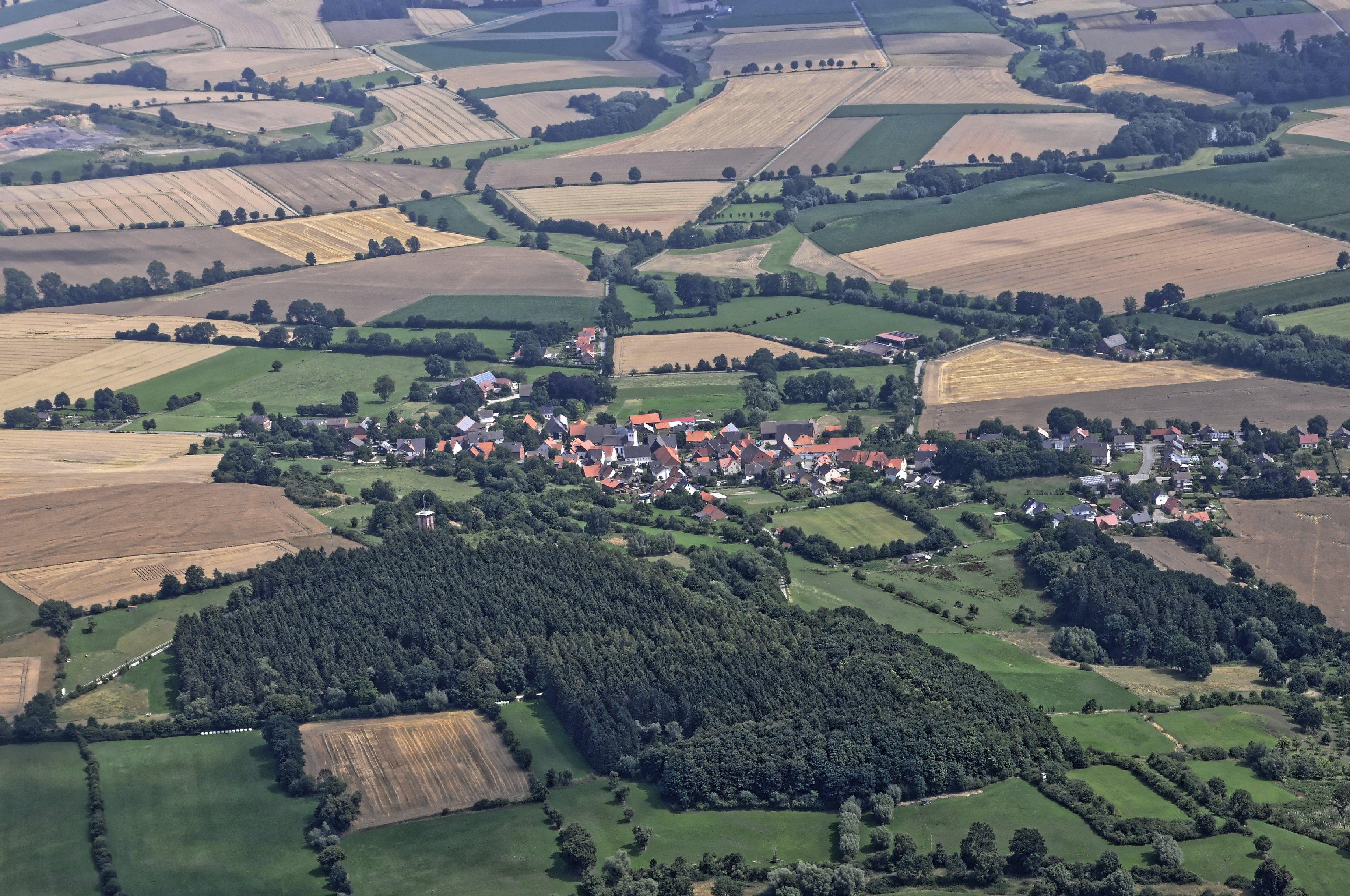 Bilder vom Flug Nordholz-Hammelburg 2015: Entrup